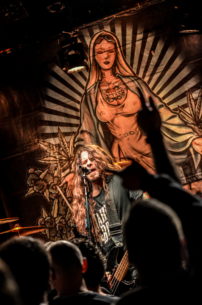 Snot en concert au Grillen de Colmar le 2 mars 2015.